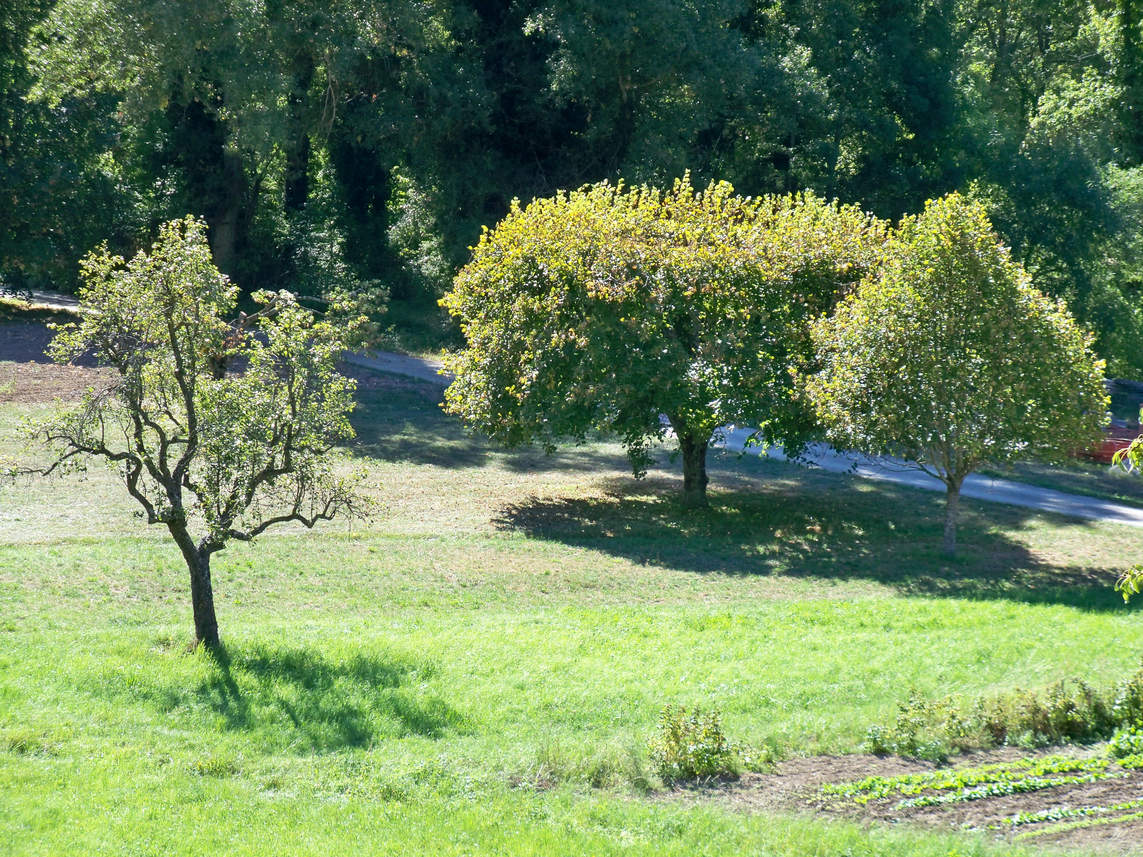 Tilleuls près de Vercoiran, dans les Baronnies